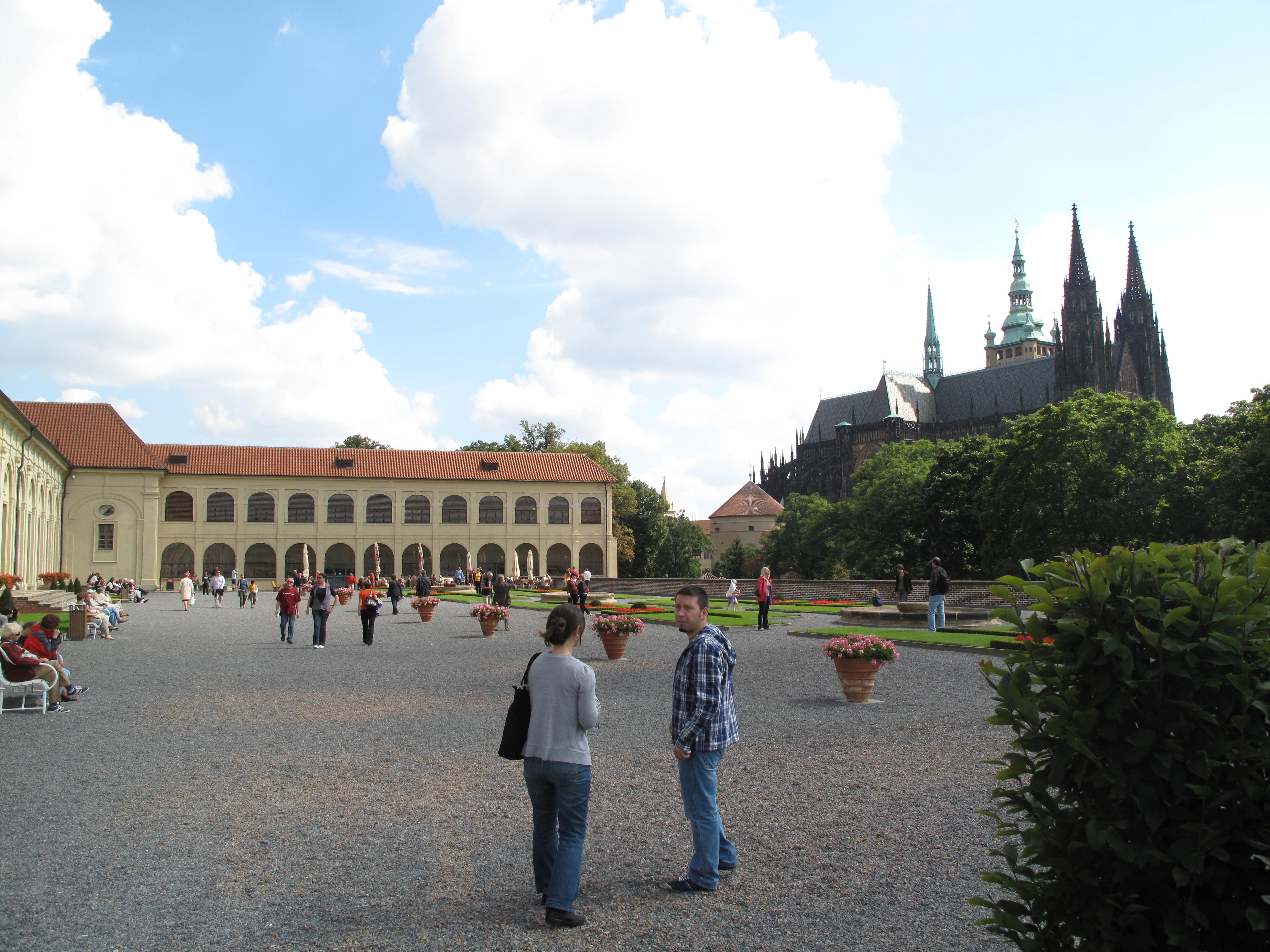 Pražský hrad